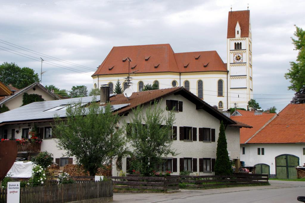 Ansicht der Pfarrkirche Denklingen vom Ort aus